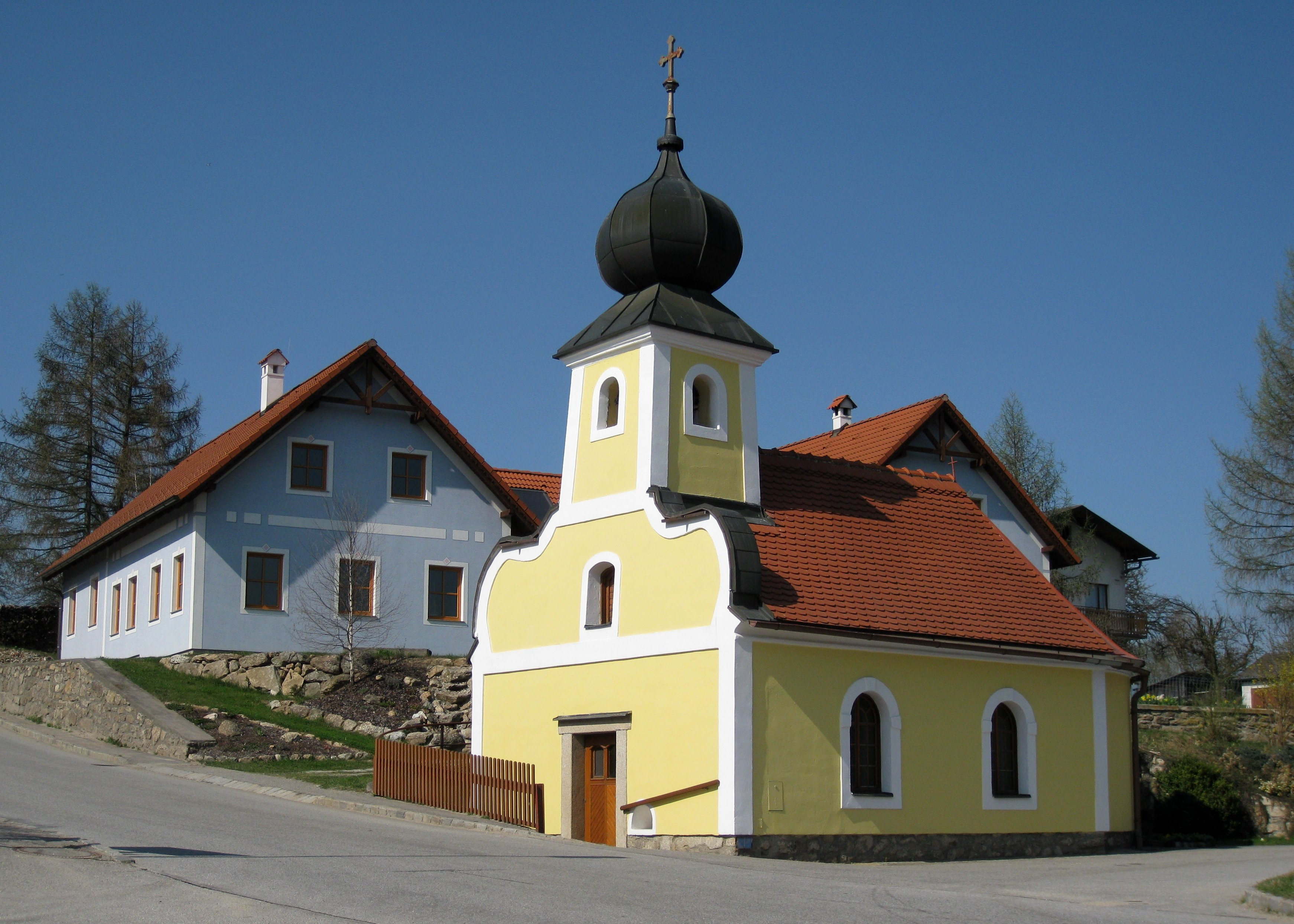 Ortskapelle Albrechts